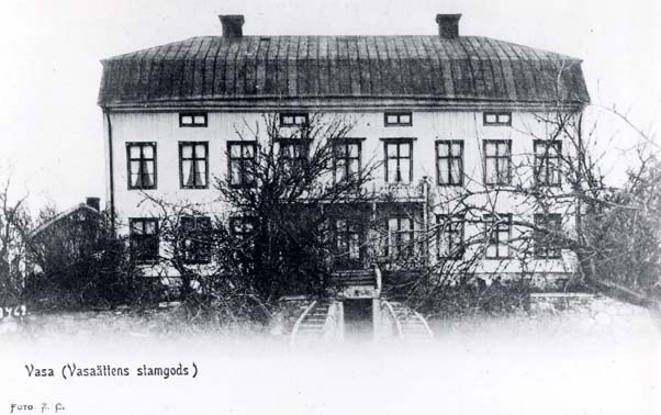 Vasa gård i Skeppstuna. Stamgods för Vasaätten.